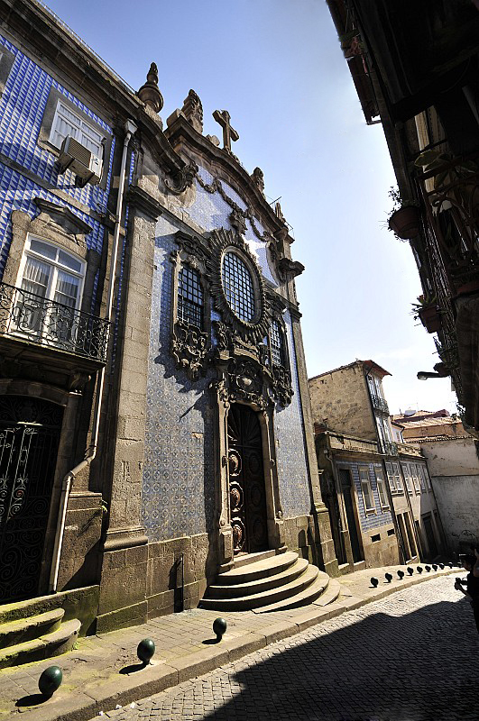 Igreja da Ordem do Terço / Igreja de Nossa Senhora do Terço e Caridade, Rua Cimo de Vila, freguesia da Sé, Porto, Portugal